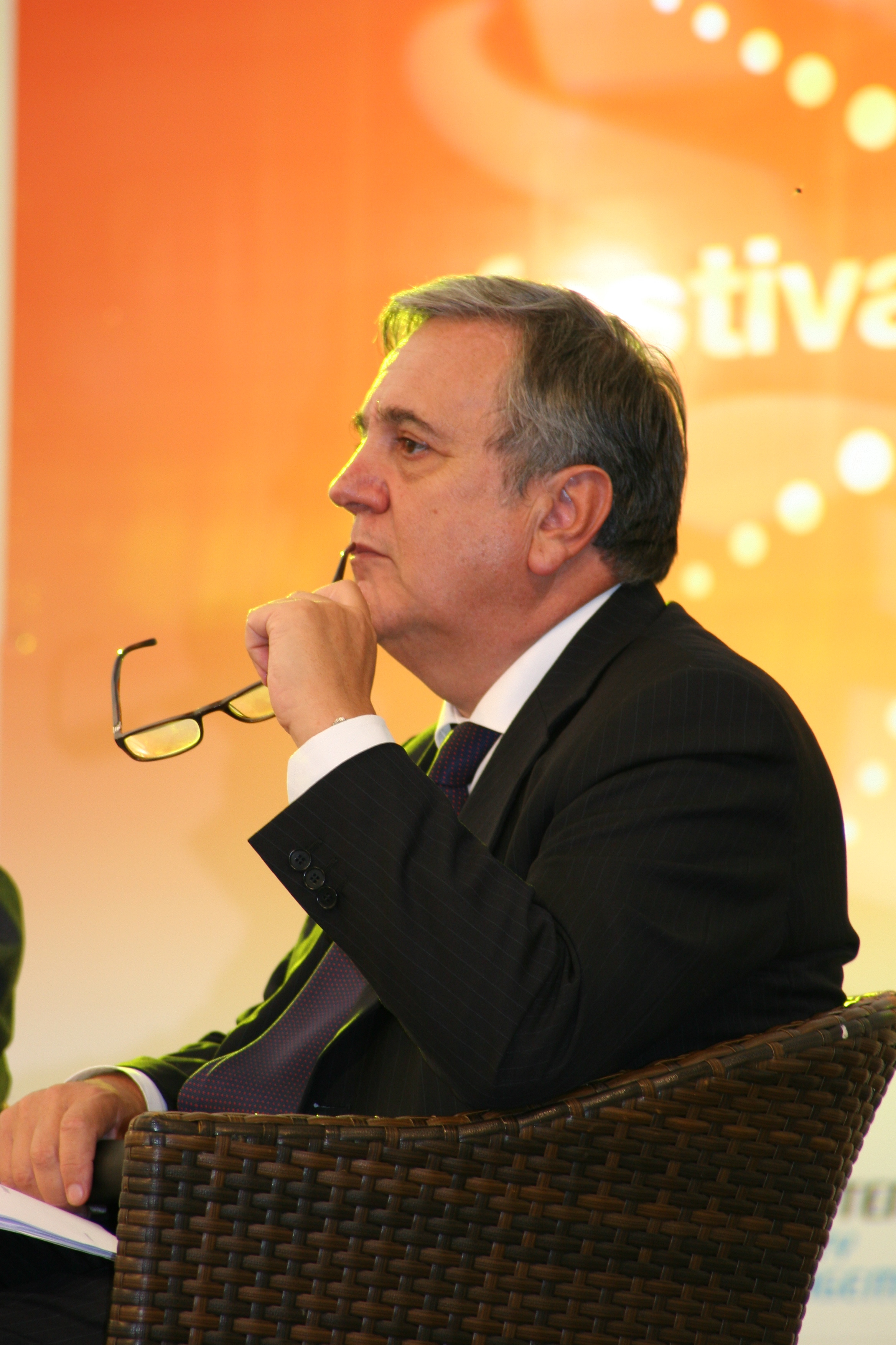 Maurizio Sacconi al Festival della Salute di Viareggio.